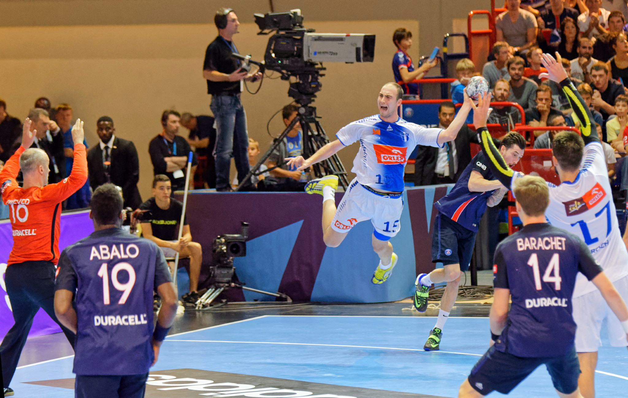 Rencontre de phase de groupe de la ligue des champions 2015-16 entre le PSG et le club polonais de Orlen Wisla Plock. A la Halle Carpentier (Paris), le 27 septembre 2015.